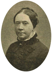 Portret. Uit: Op de Hoogte 3 (juni 1906) 344.